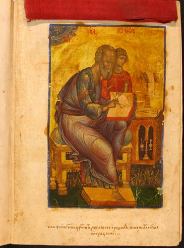 Evangelist Johannes mit Personifizierung der Heiligen Weisheit Миниатюра "Евангелист Иоанн", над которой тканевая завеса бордового цвета. На нижнем поле золотом запись художника Радослава: "Помени, Господи, в царствии раба своего Радослава, писавшаго светые образы сие" (РНБ. F.I.591, л. 4)